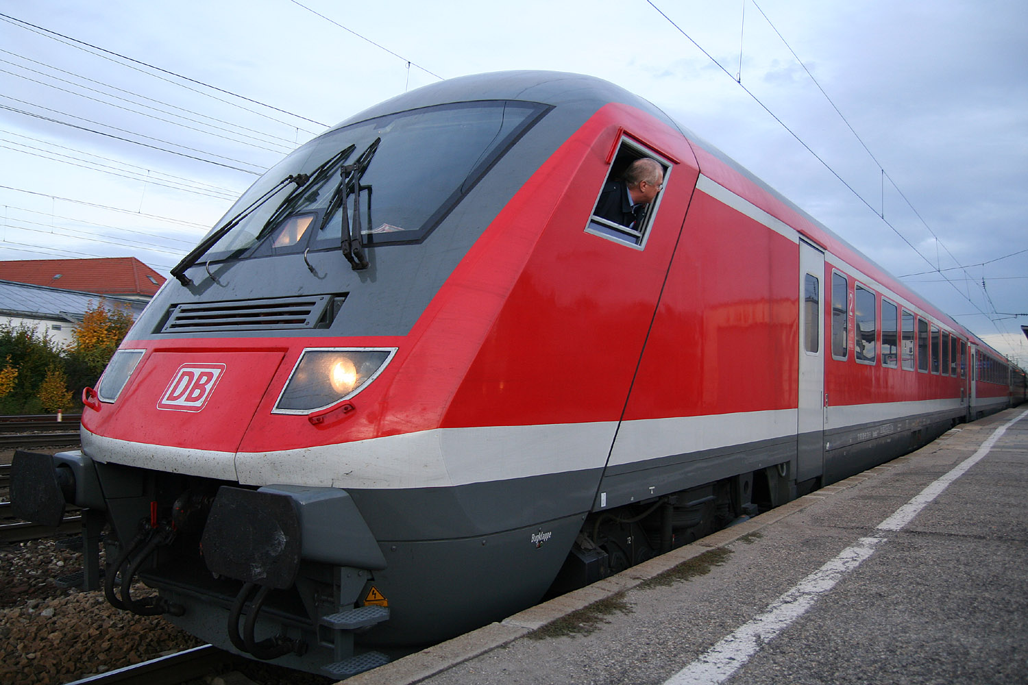 FRESH-Steuerwagen in München-Pasing, außerplanmäßig eingereicht im IC 2292